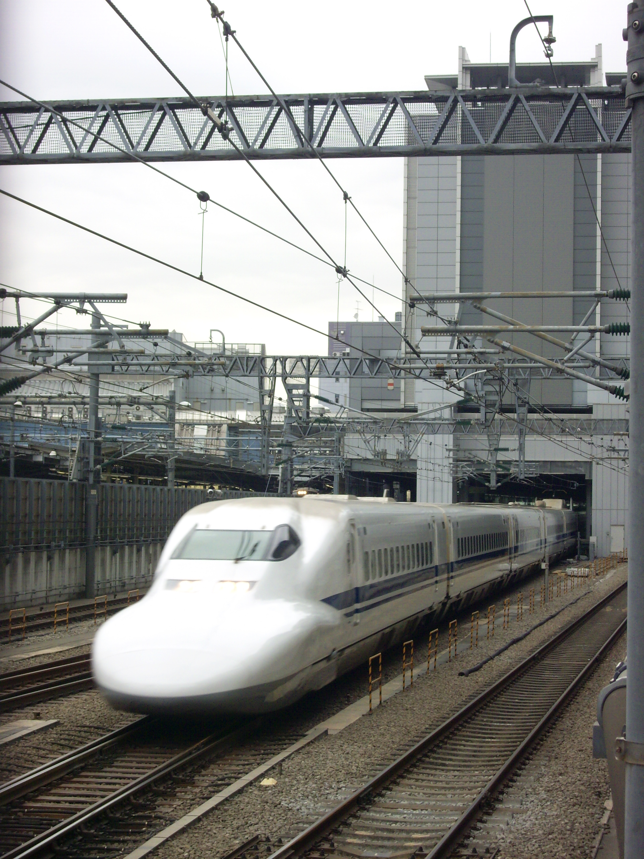 JR東海品川ビル（品川駅ビル）B棟下から出発する東海道新幹線のぞみ ㊟カメラを起動すると日付機能が出荷時のものに初期化されるため、ファイル履歴の撮影・投稿日時とメタデータの原画像データの生成日時が異なります